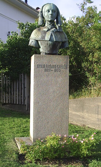 Byst som föreställer Emilie Flygare-Carlén (1807-1892) placerad i Strömstad. Bysten skapad 1939 av skulptören Carl Fagerberg (1878-1948). Fotograf:Tubaist